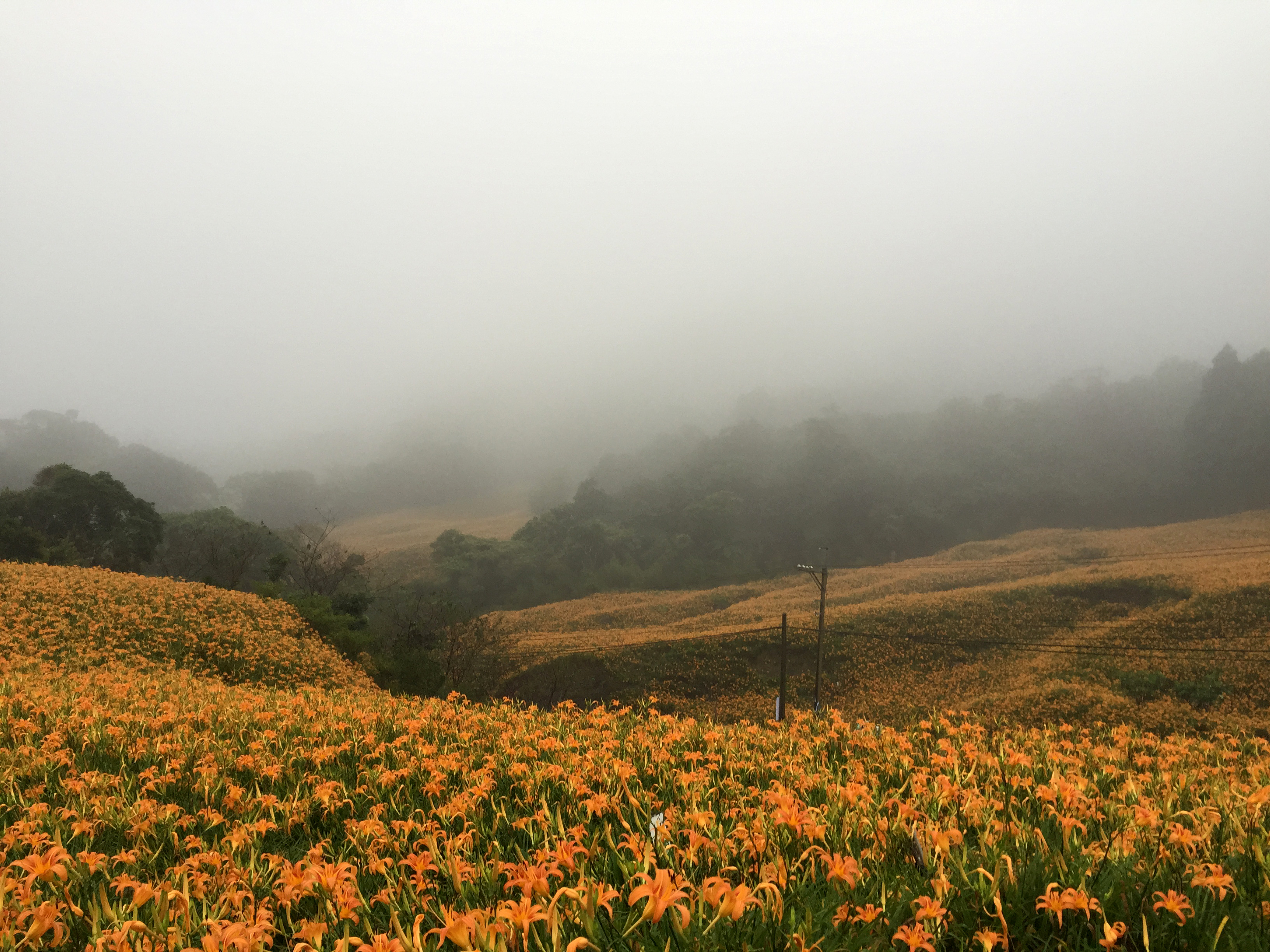 每年金針花季這裡車水馬龍，赤科山是金針花故鄉之一，得天獨厚的地形和氣候，是金針花最好的養分。